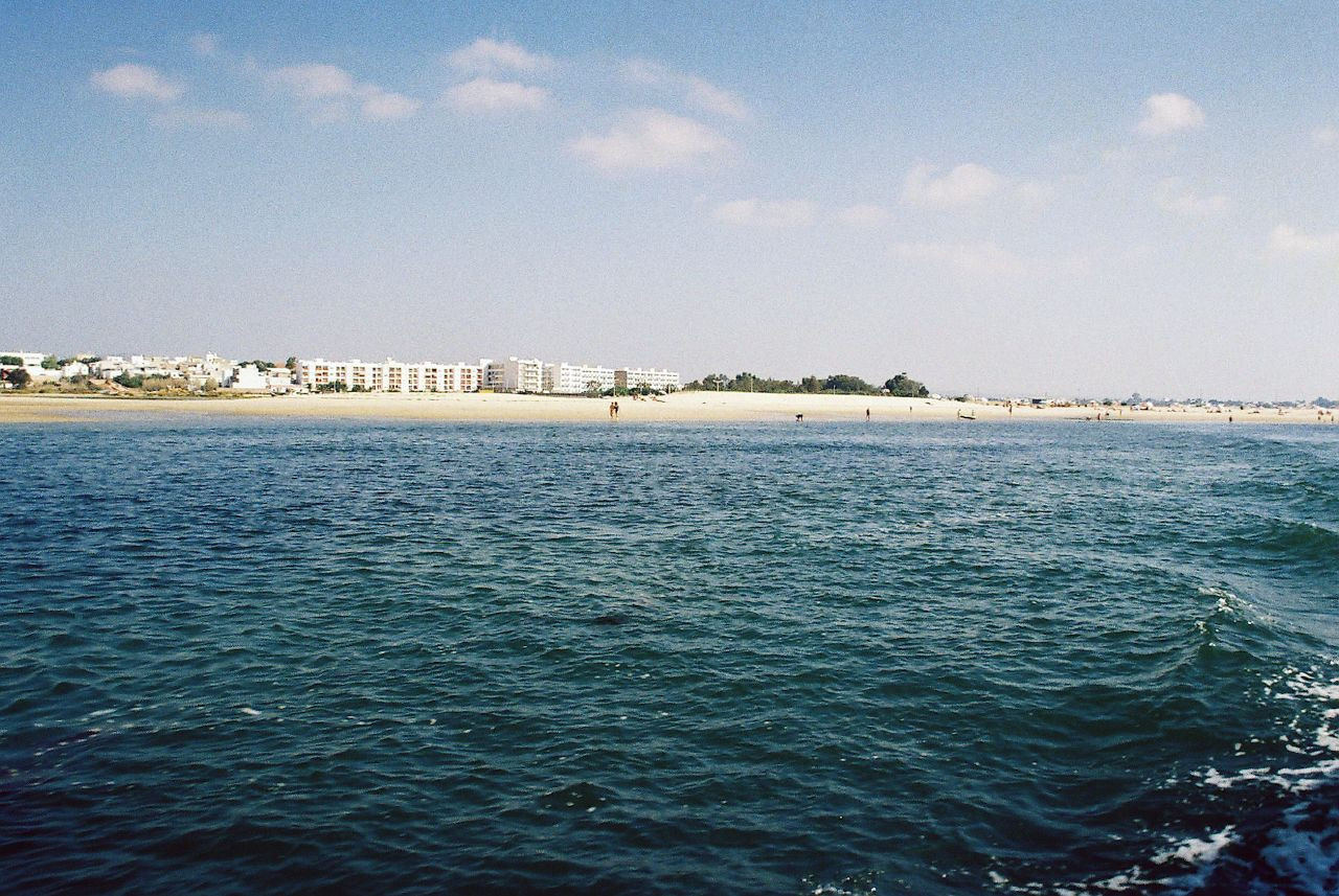 Ria Formosa